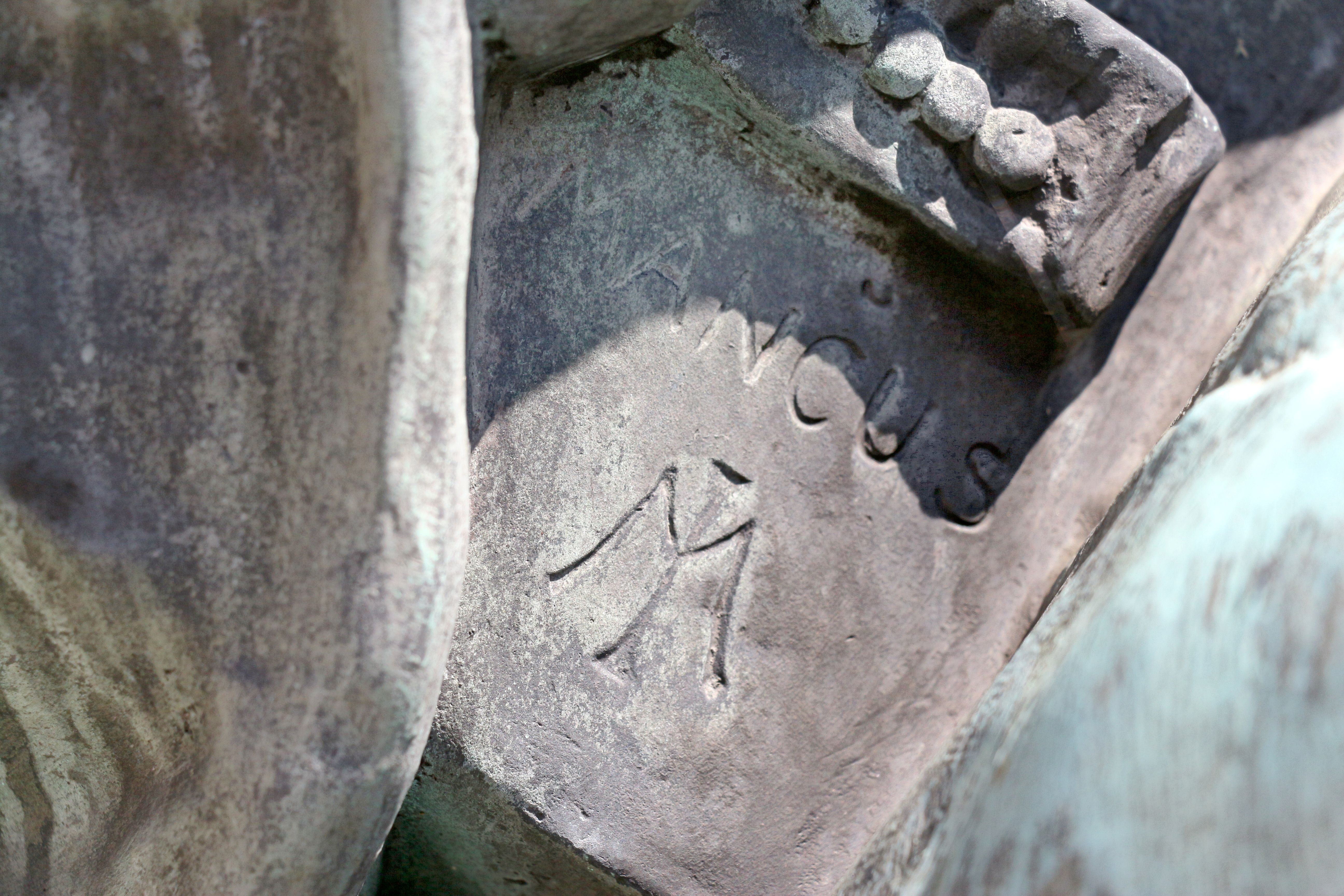 Das Mohr-Gruber-Denkmal in Oberndorf bei Salzburg; Initialen des Bildhauers und der Vermerk Mancus als Hinweis auf eine Unvollkommenheit